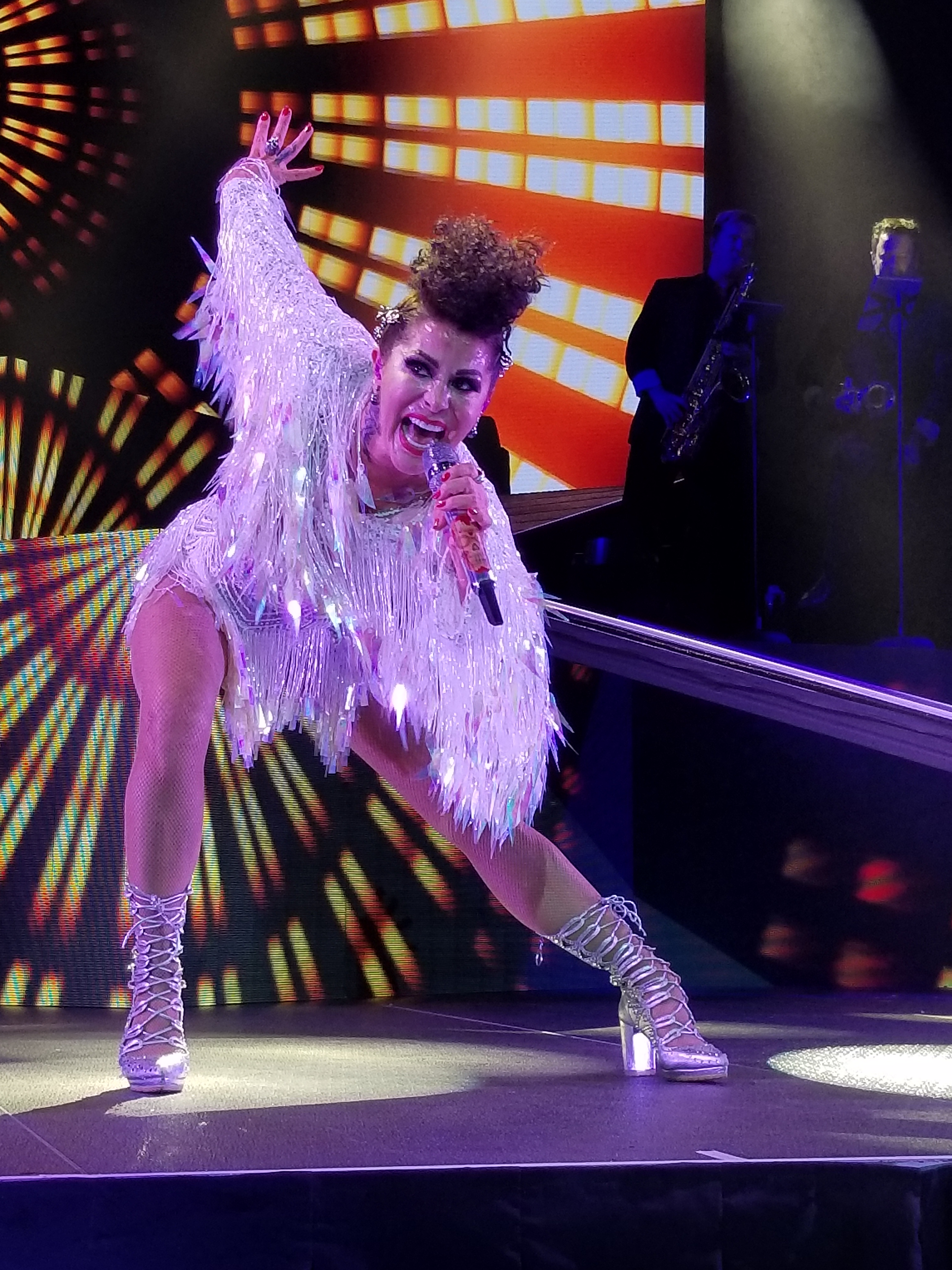 La Reina del Rock